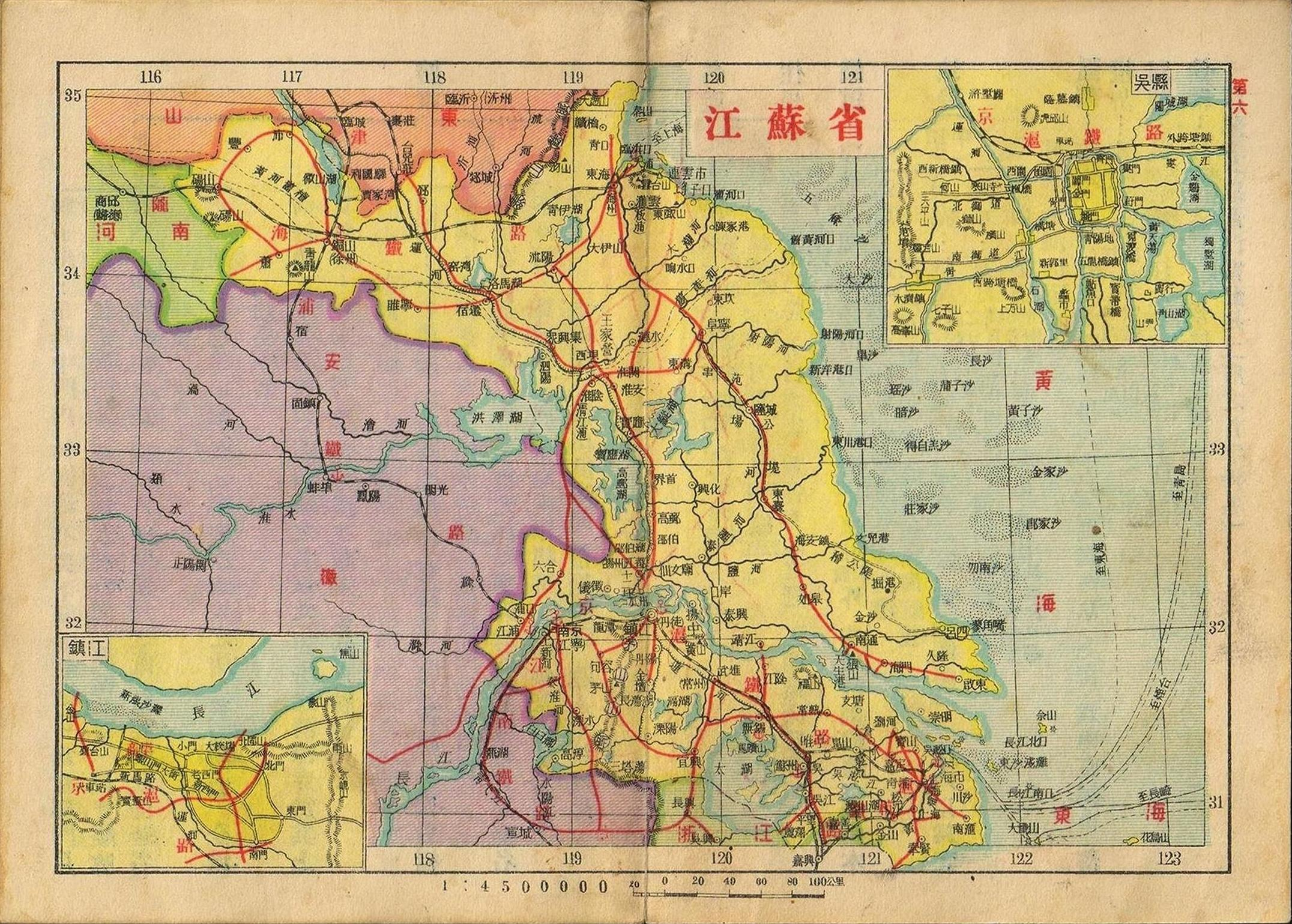 亚新地学社1936年《袖珍中华全图》江苏省